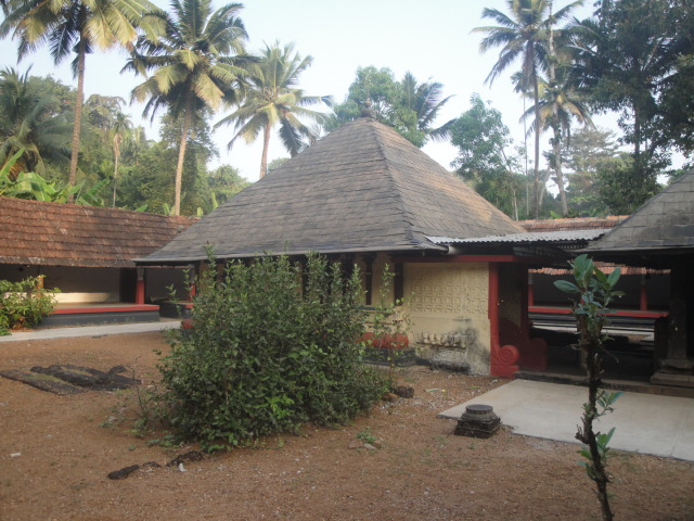 തിരുവാറ്റാ ക്ഷേത്രം - ശ്രീകോവിൽ